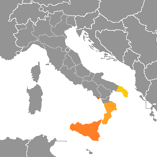 Variedades meridionales extremas de las lenguas italianas